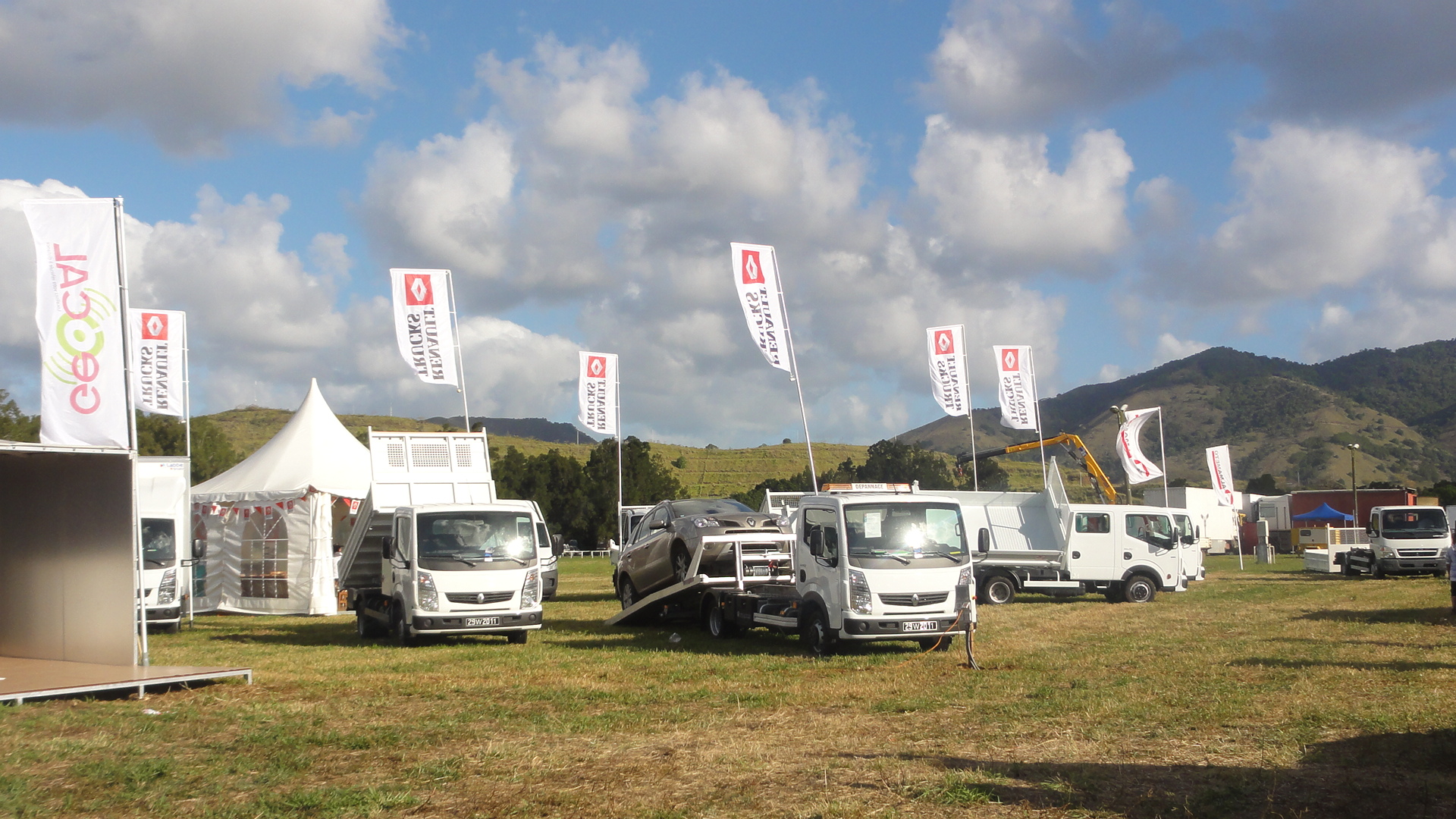 Exposition automobile